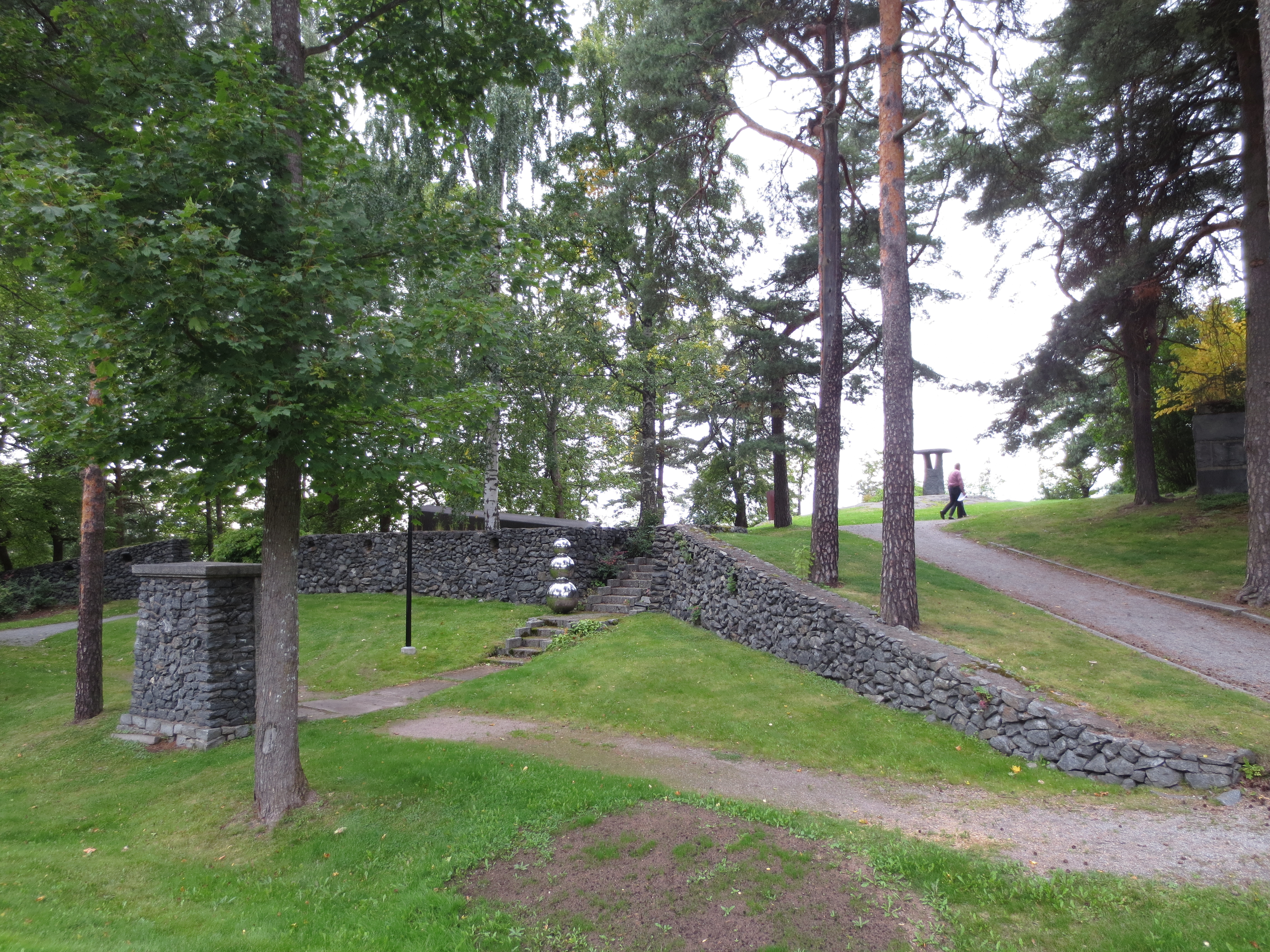 Veistospuisto, Särkänniemi Tampere